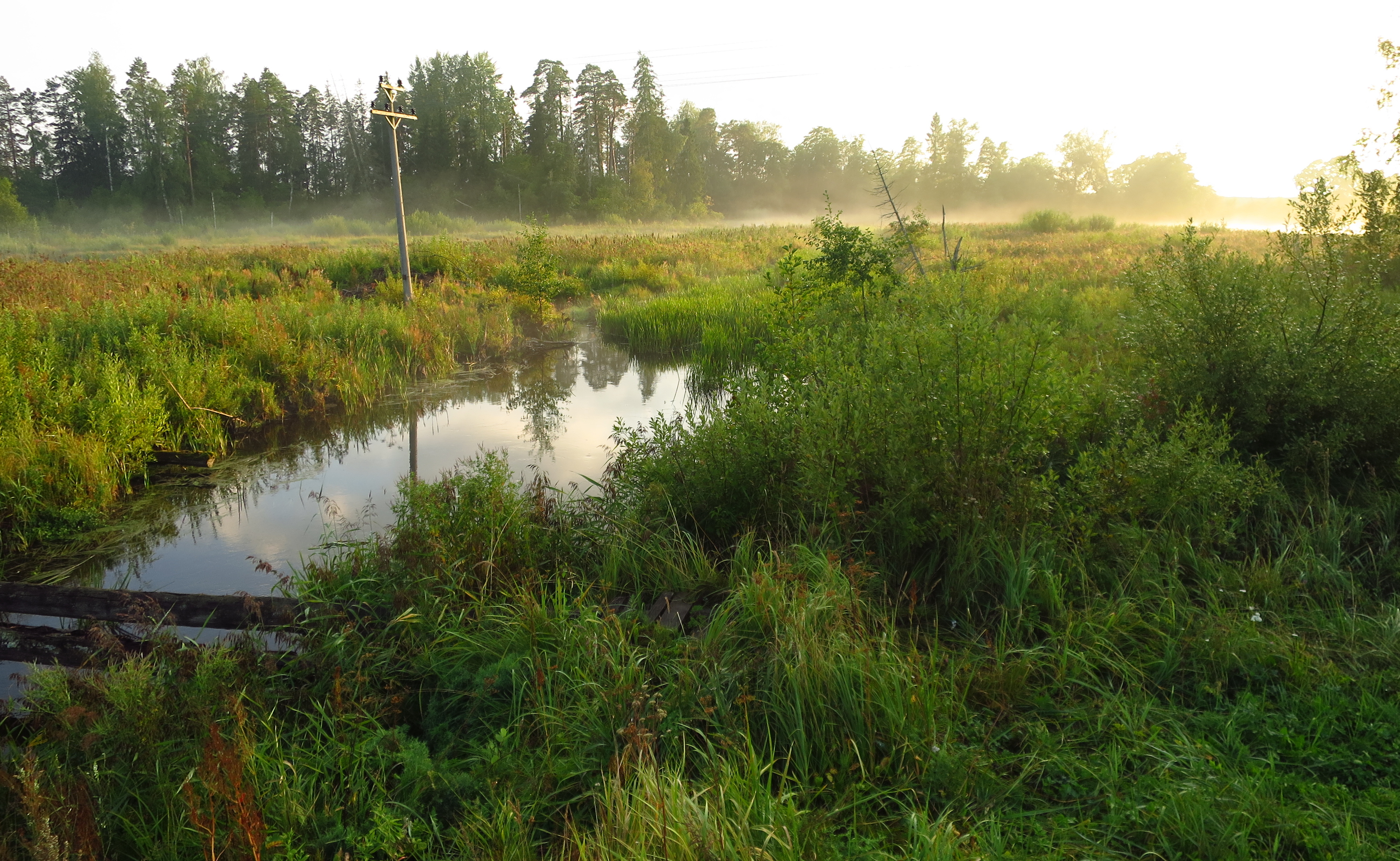 Nõmme jõgi